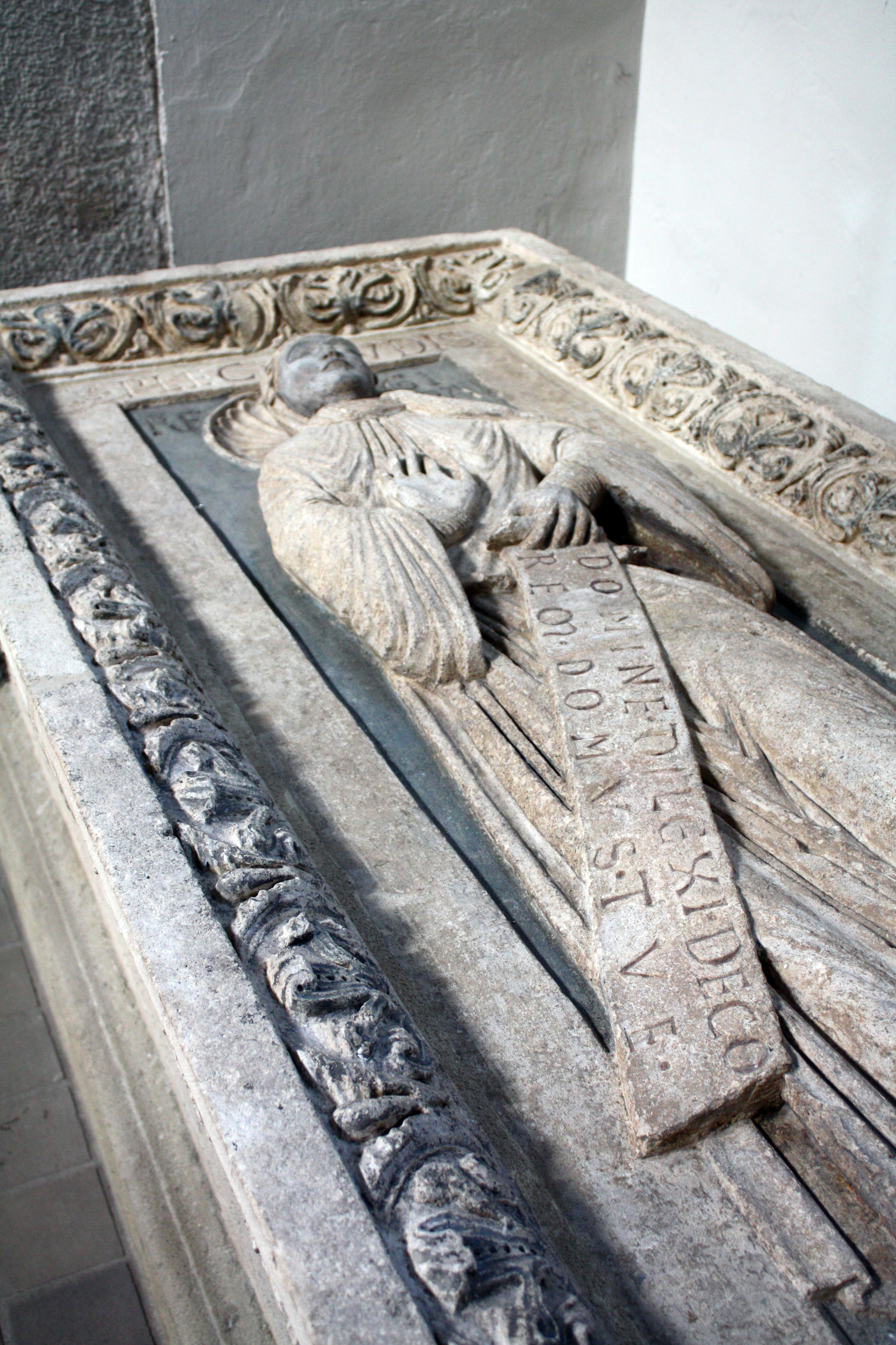 Romanische Grabplatte der Plektrudis, St. Maria im Kapitol. Köln, 3. Viertel des 12. Jahrhunderts, Kalksandstein; Höhe 202 cm, Breite 67 cm